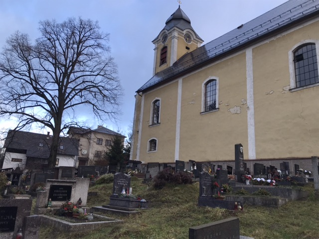 Památná lípa malolistá na hřbitově u kostela sv. Antonína v Loučkách, 5 km od města Turnov